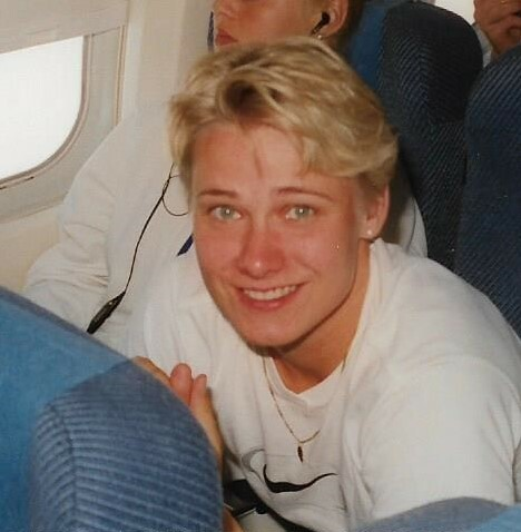 Heli Rantanen lentokoneessa matkalla yleisurheilun Euroopan-mestaruuskilpailuihin Budapestiin 17. elokuuta 1998.